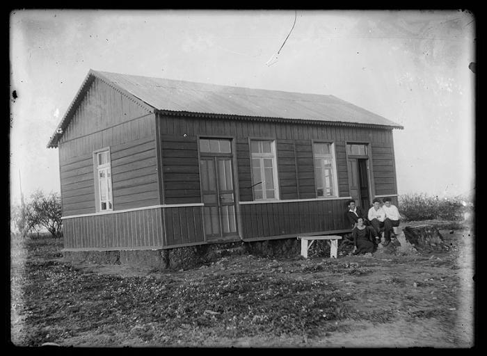 צריף בשכונת ברנדיס ,שכונה הנקראת על שמו של לואיס ברנדיס שהיה שופט עליון בארצות הברית ועסקן ציוני נלהב.